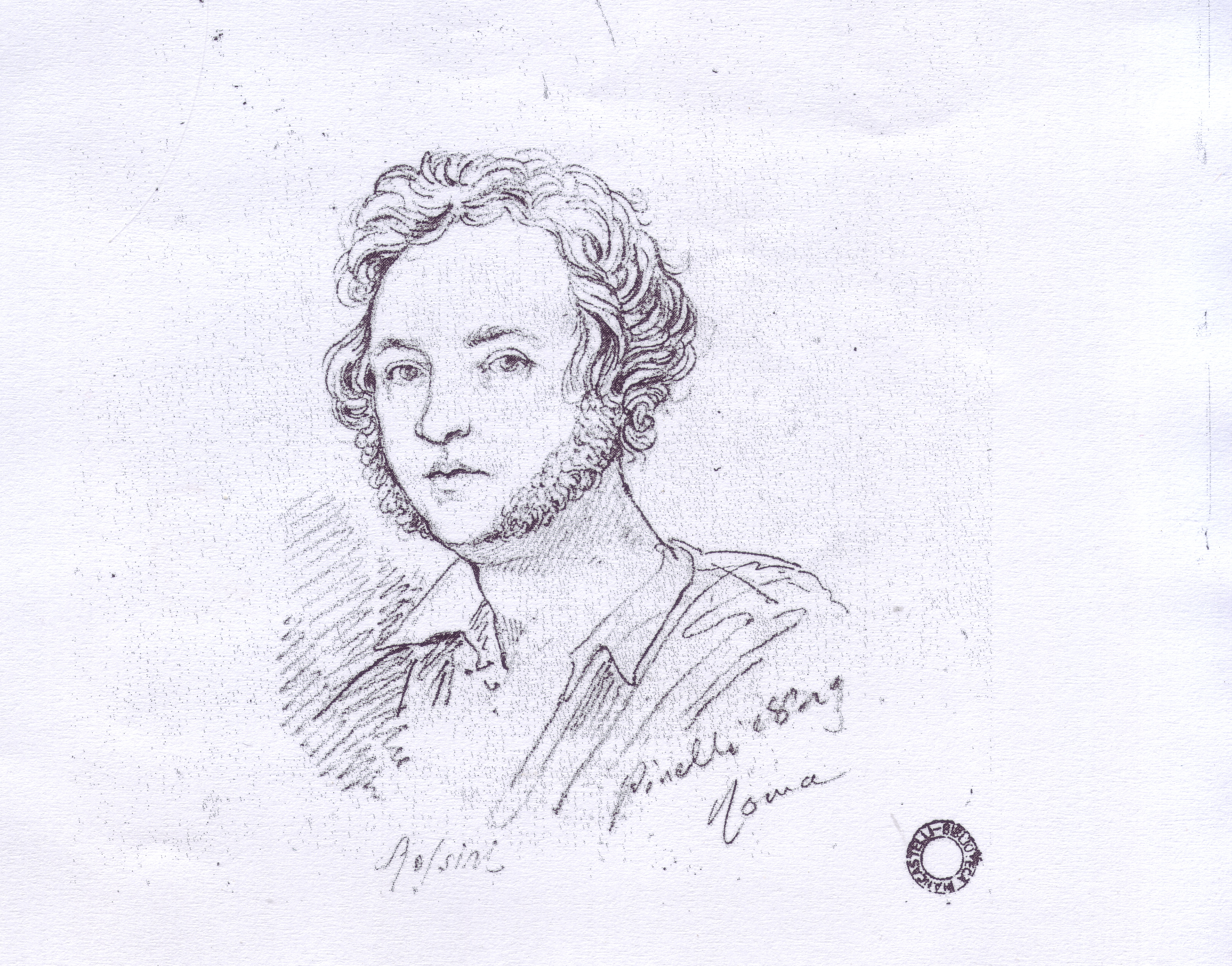 Bartolomeo Pinelli, ritratto a lapis di Luigi Rossini (1823). Rossini stesso lo definì "assomigliantissimo". Dal catalogo della mostra "Luigi Rossini incisore - Vedute di Roma 1817 /1850", Roma 1982